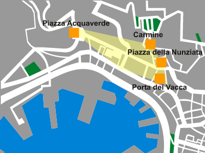 Mappa del sestiere di Pre' - Genova